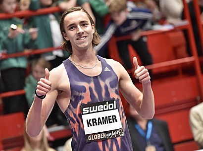 Andreas efter 1:47.85 i Globen.